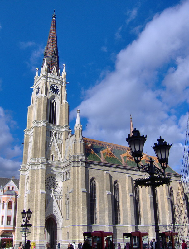 Католичка црква после скидања скела, јануар 2007.